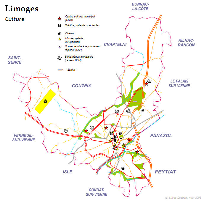 Carte de Limoges avec principaux sites culturels (rajout du FRAC absent sur la carte Image:Limoges - Culture.PNG).